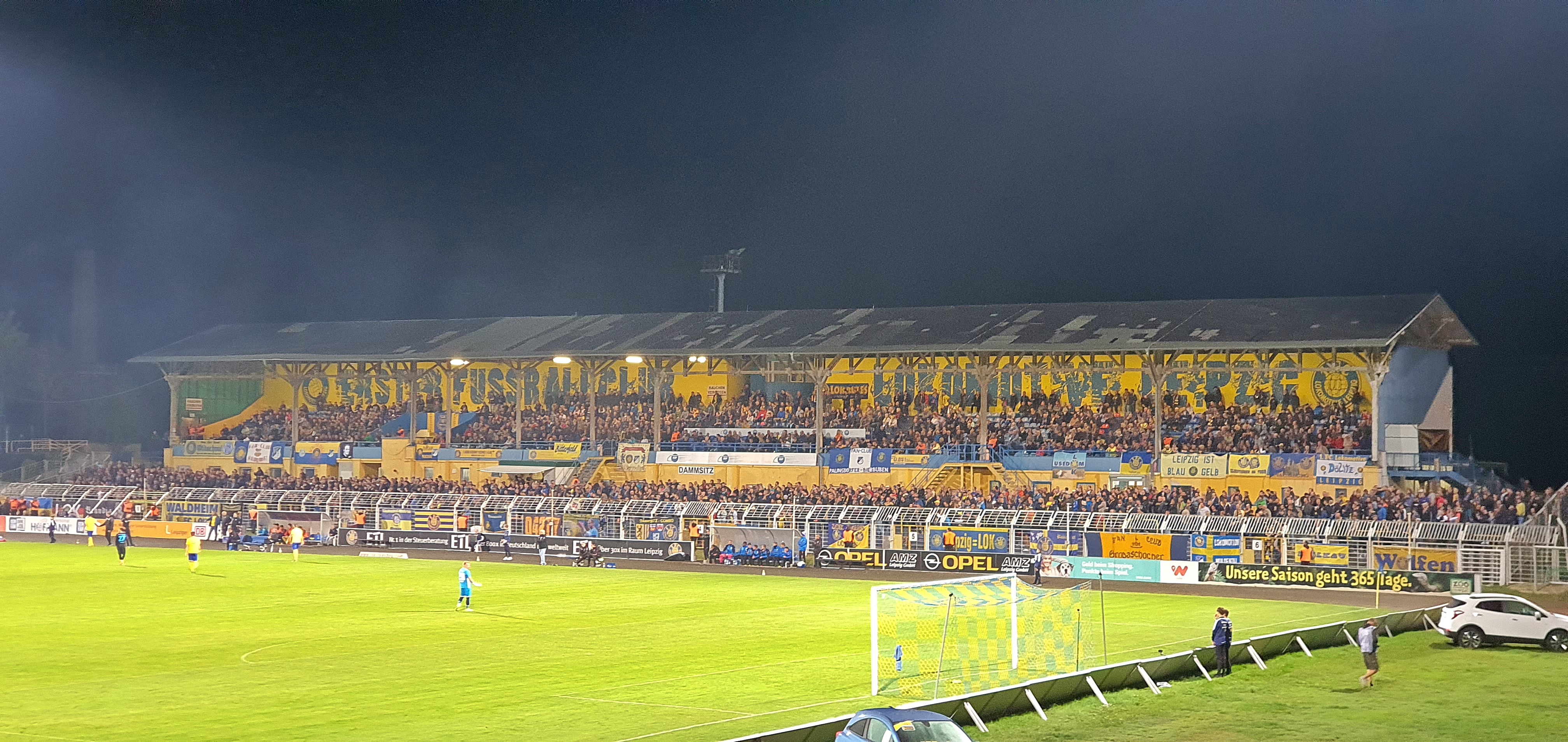 Bruno-Plache-Stadion - Sicht auf Tribüne beim Spiel gegen FSV Wacker 90 Nordhausen. (Fr, 27.09.19 - 19:30 Uhr)